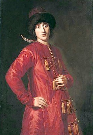 Aleksander Benedykt Sobieski, son of John III Sobieski, dressed in Polish costume (red żupan).